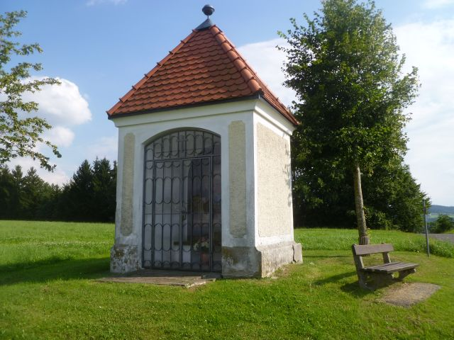 Elisabethkapelle